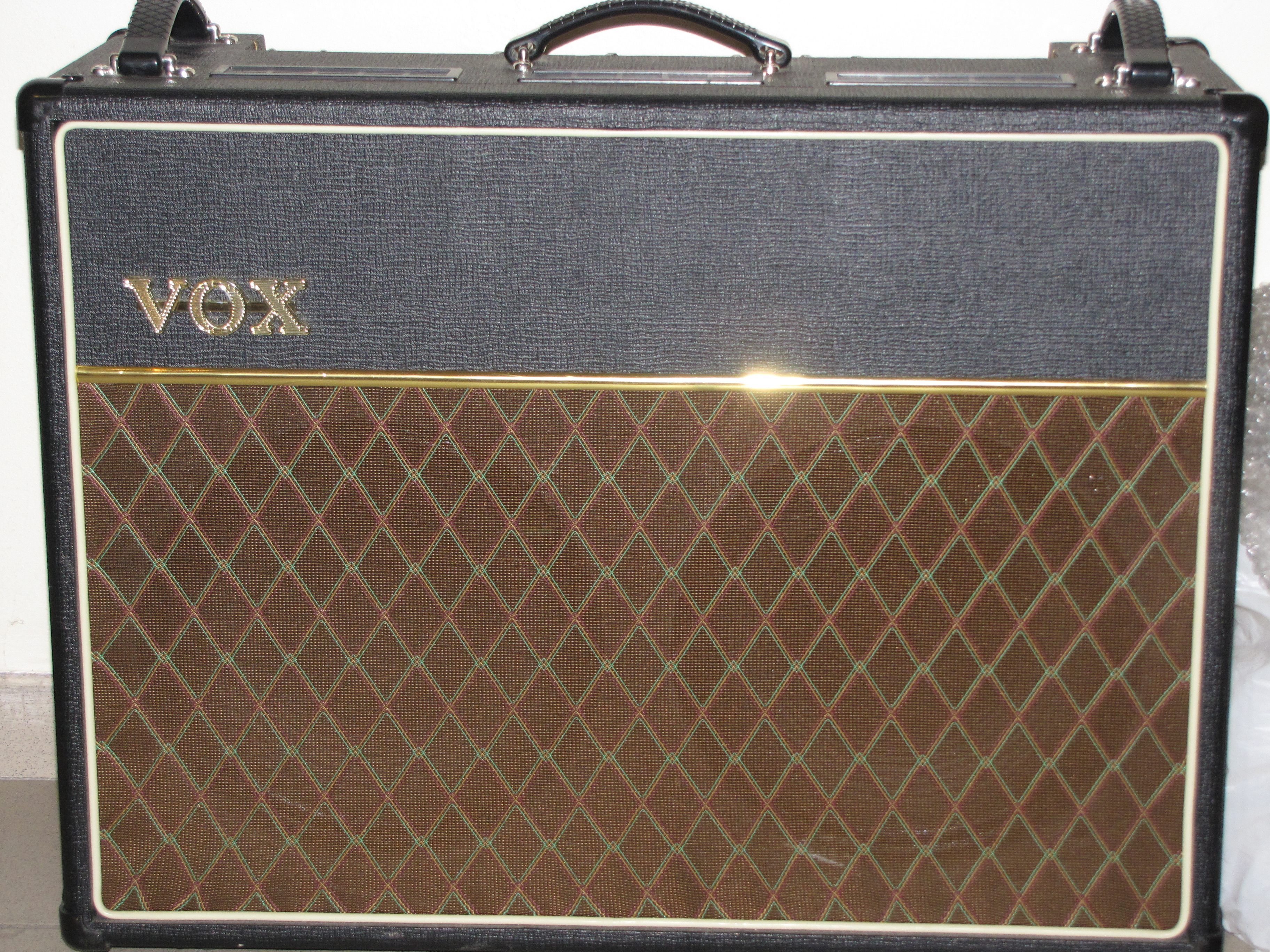 VOX AC30 CC2